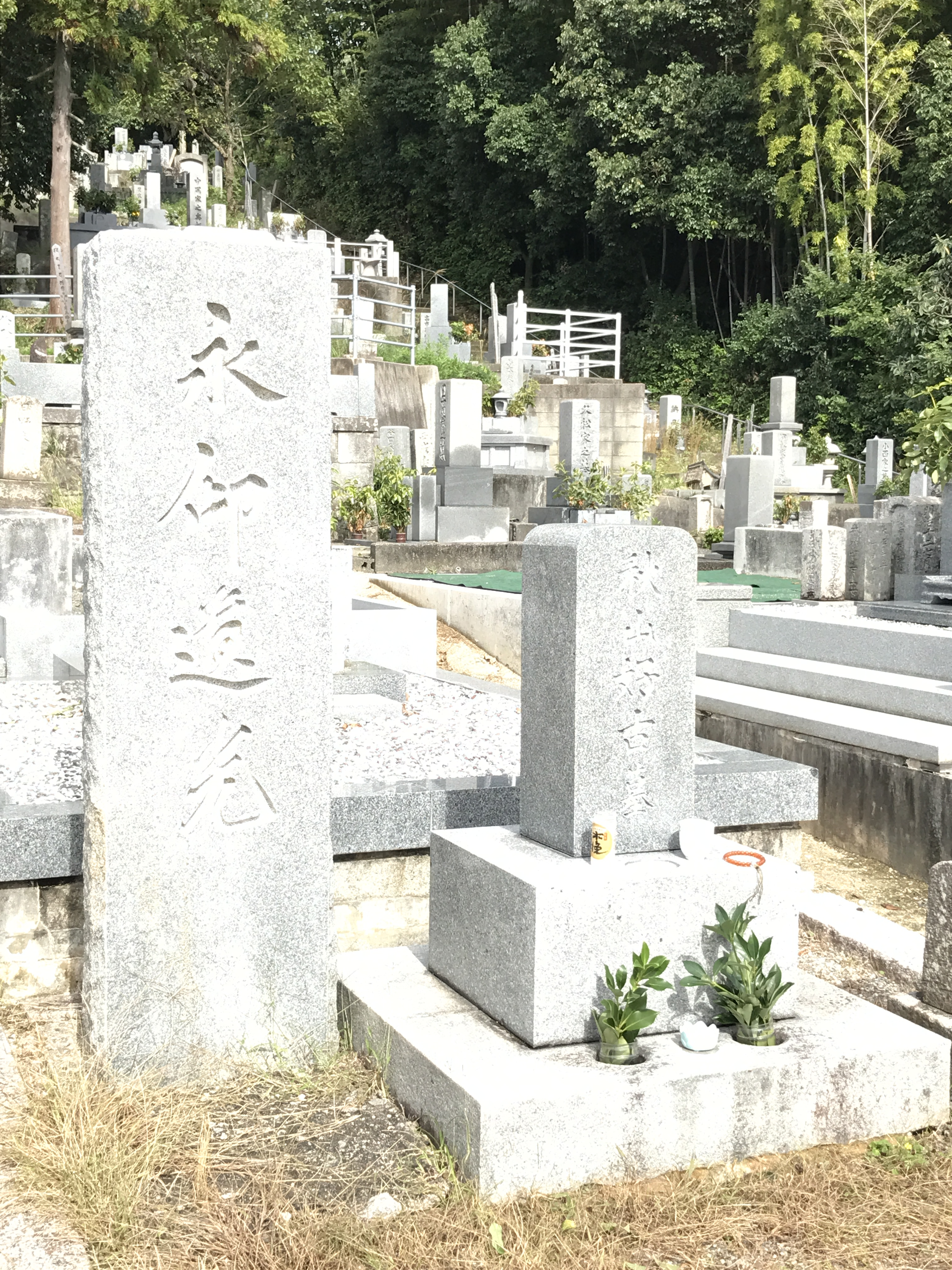 秋山大将の墓(松山)